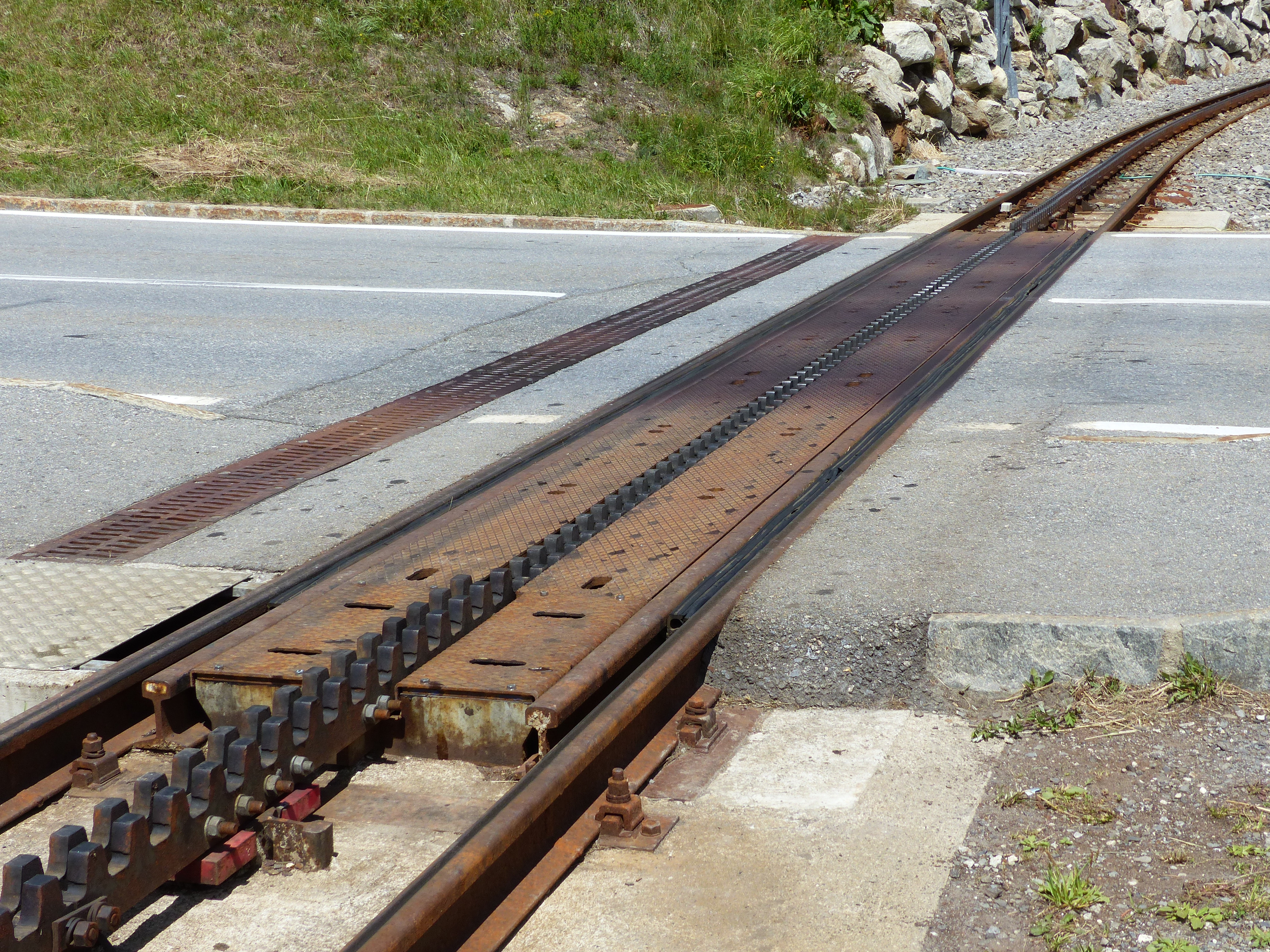 Bahnübergang der Dampfbahn Furka-Bergstrecke in Oberwald direkt oberhalb des Bahnhofs. Die Zahnstangen können eingefahren werden.